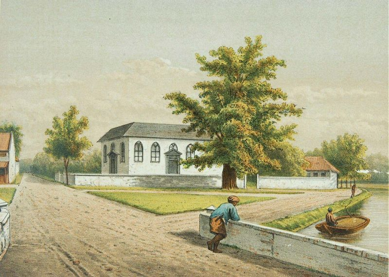 Litho. Kleurenlitho naar een oorspronkelijke aquarel van Rappard.. De oude Portugese buitenkerk in Batavia